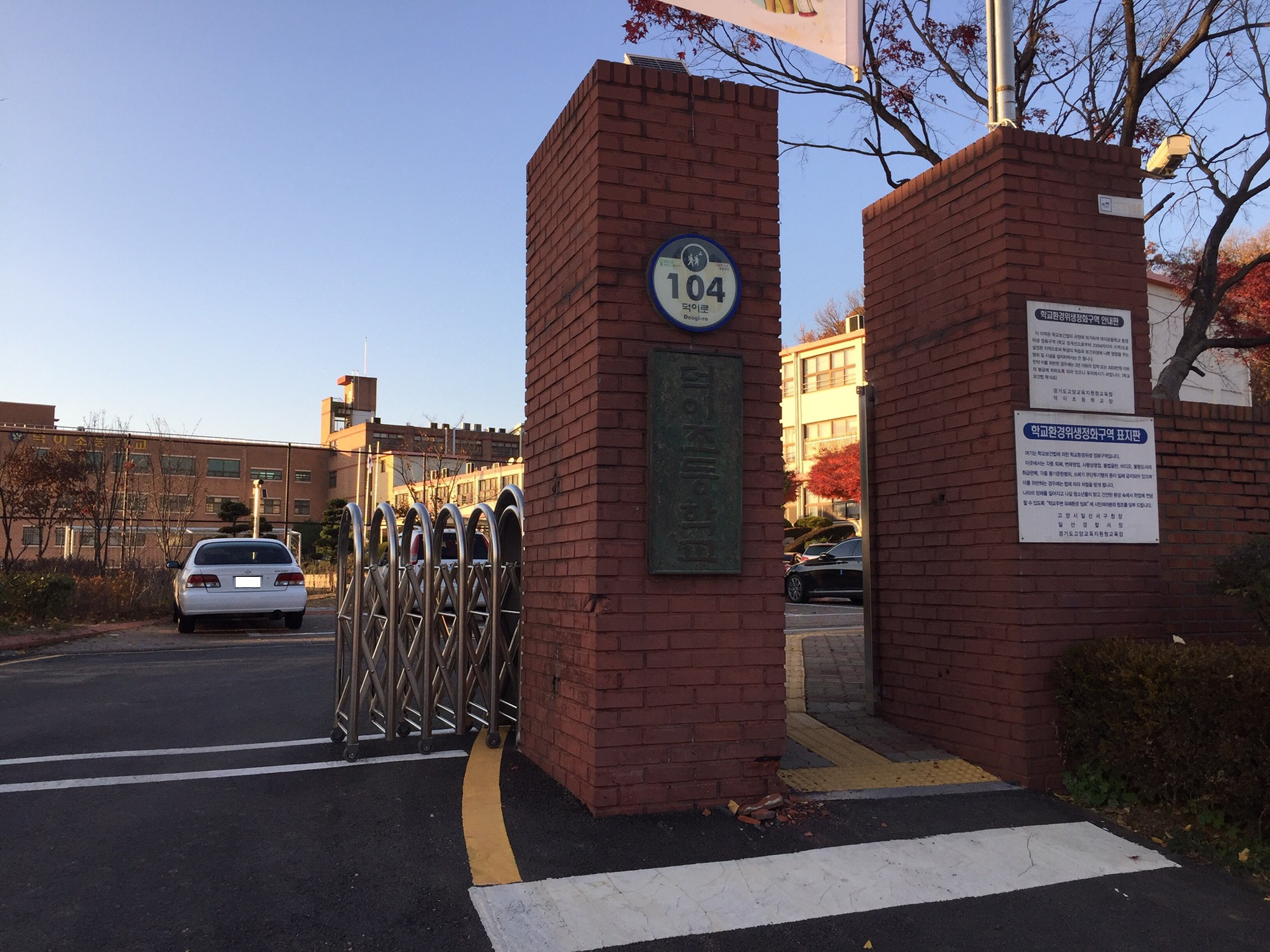 대한민국 경기도 고양시 덕이동에 위치한 덕이초등학교 정문의 모습